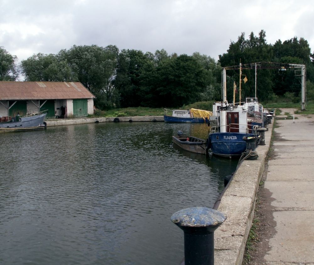 Šturmų ostas